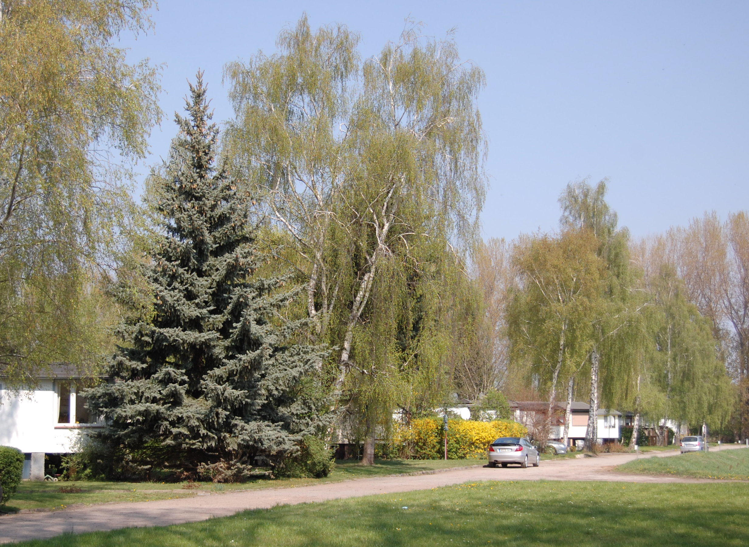 Lauben am Hafen Fermersleben